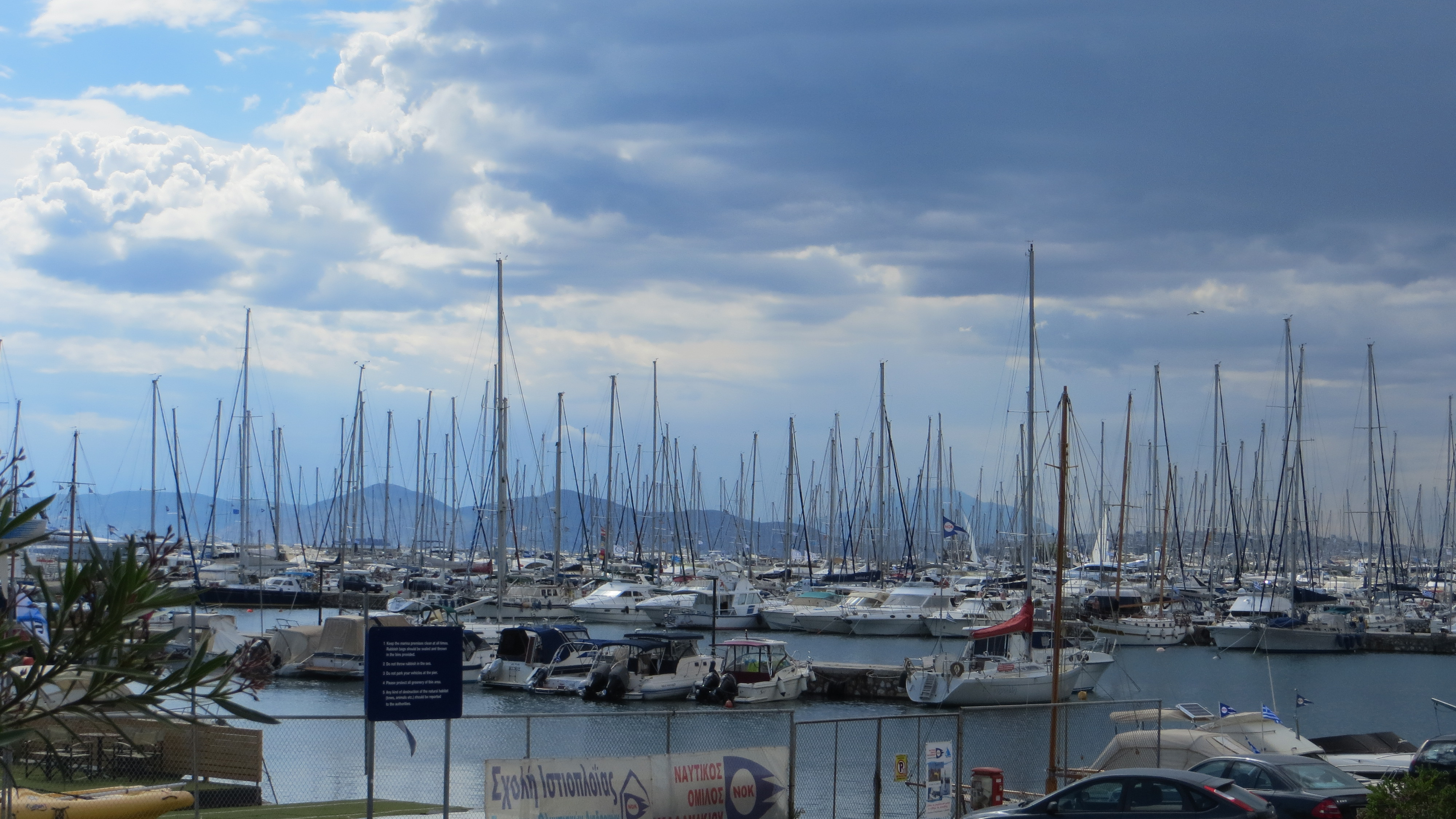 Alimos